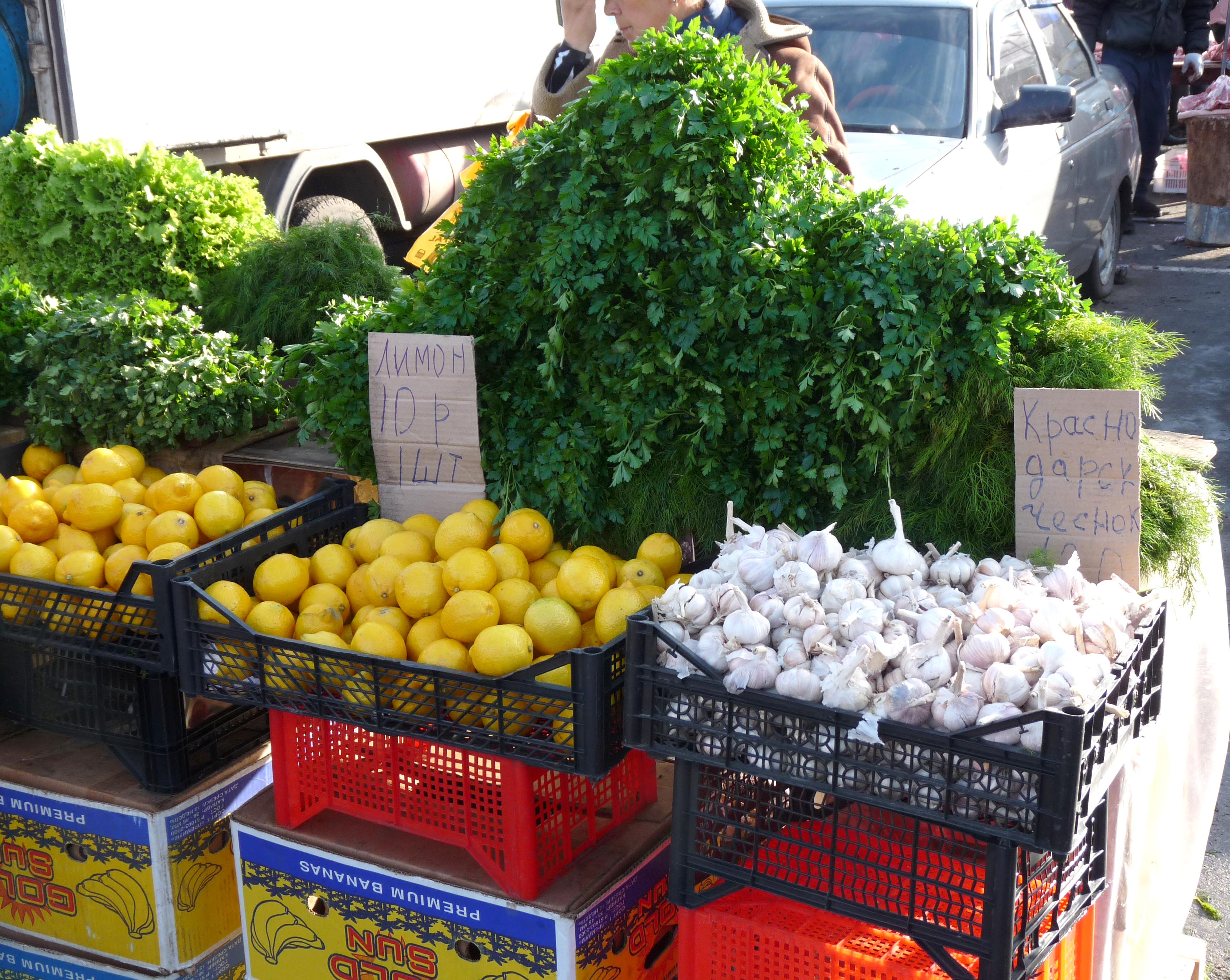 Samara Market 05